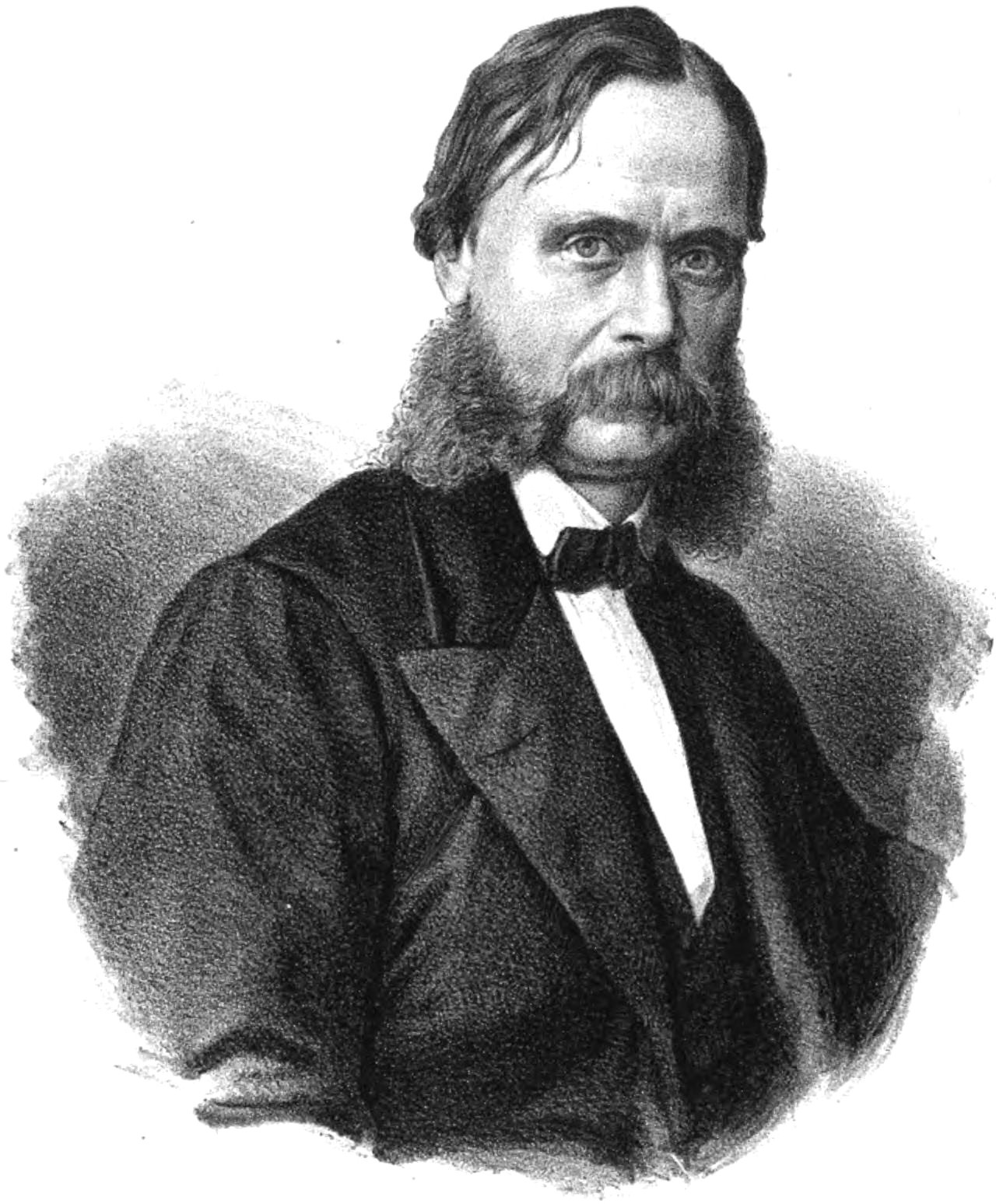 Målaren Egron Lundgren.